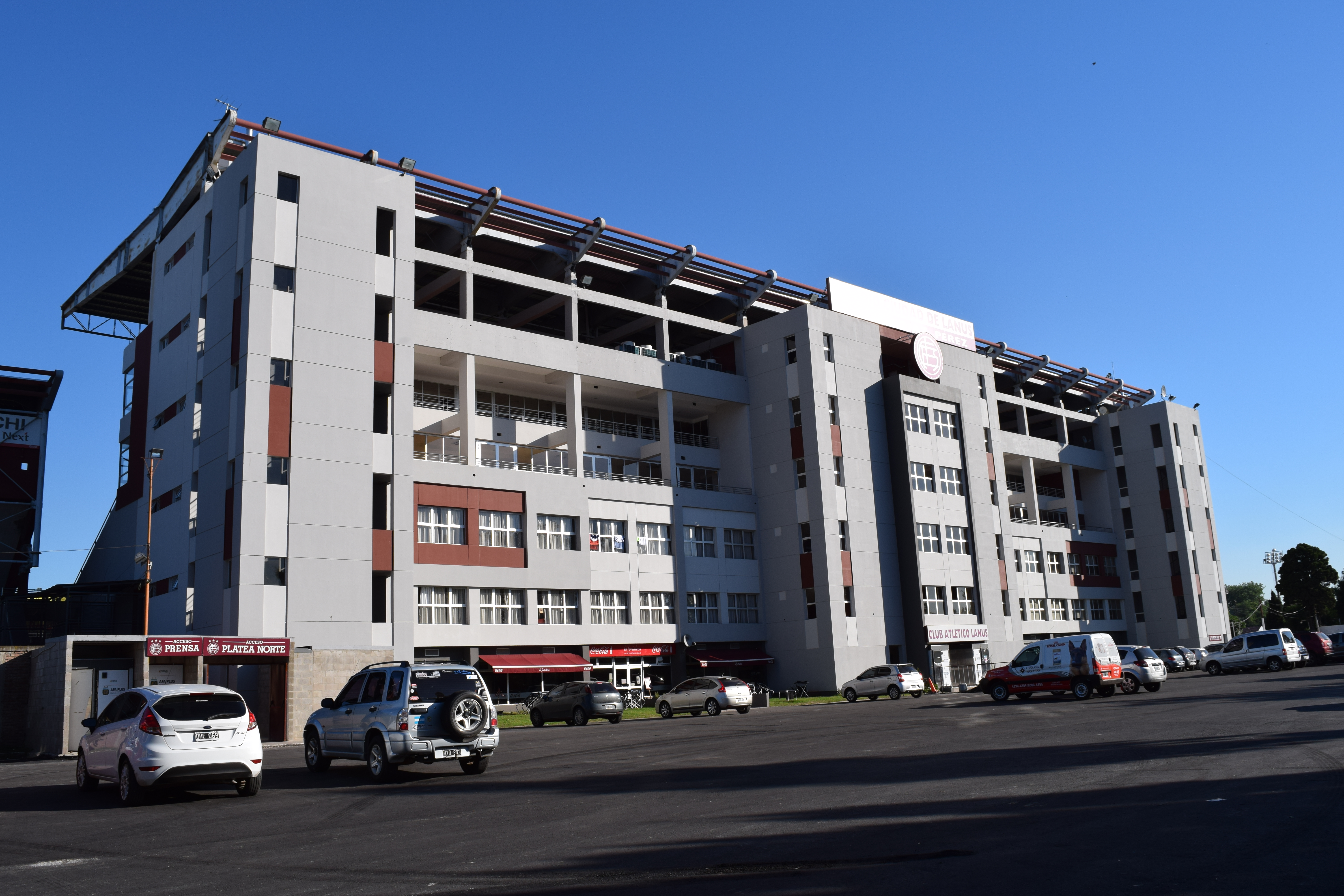 Fachada completa del Estadio Ciudad de Lanús - Néstor Díaz Pérez, luego de las reformas finalizadas en el año 2014.